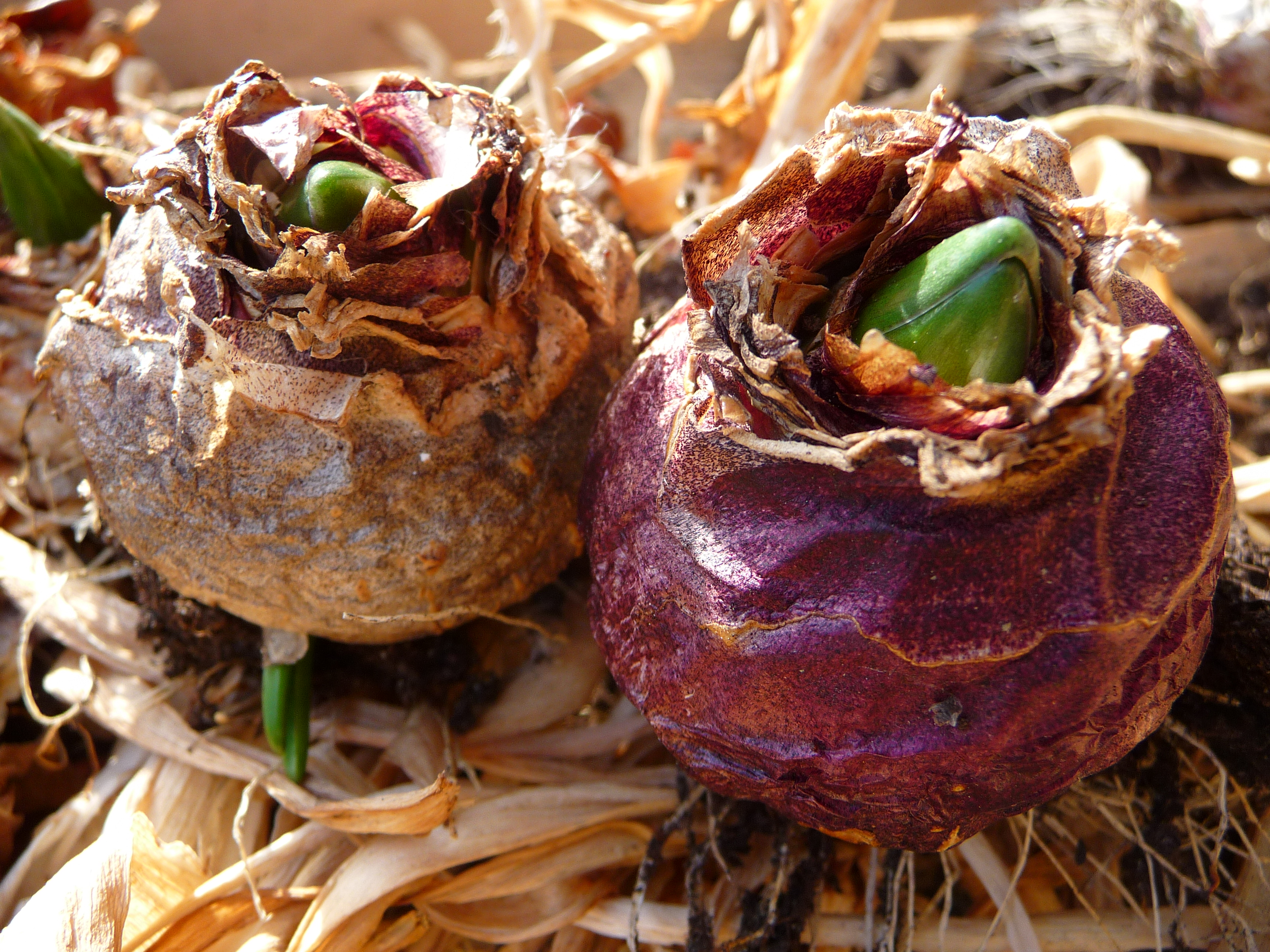 Austreibende Gartenhyazinthen (Hyacinthus orientalis)